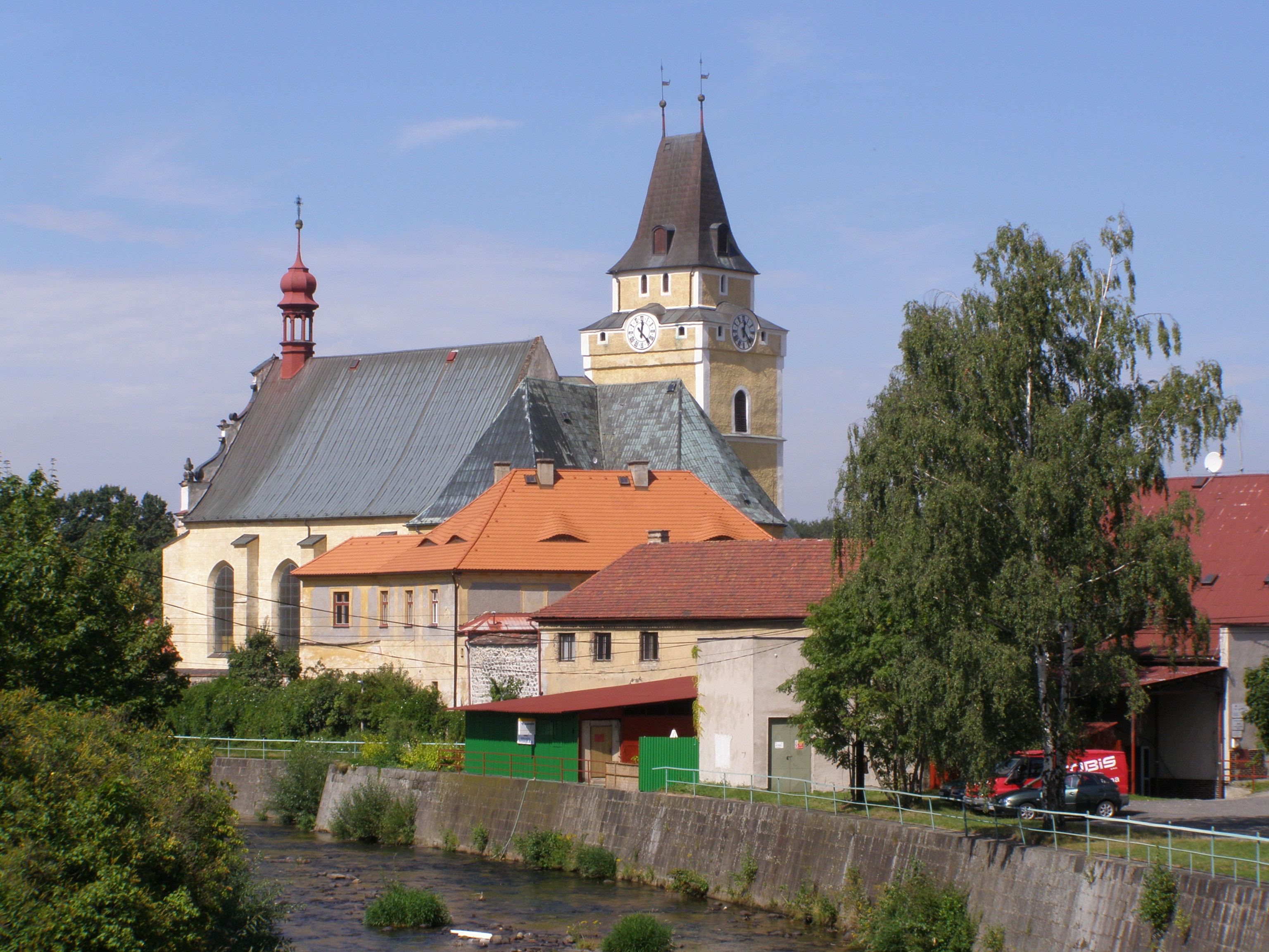 Česky: Frýdlant, kostel Nalezení svatého Kříže